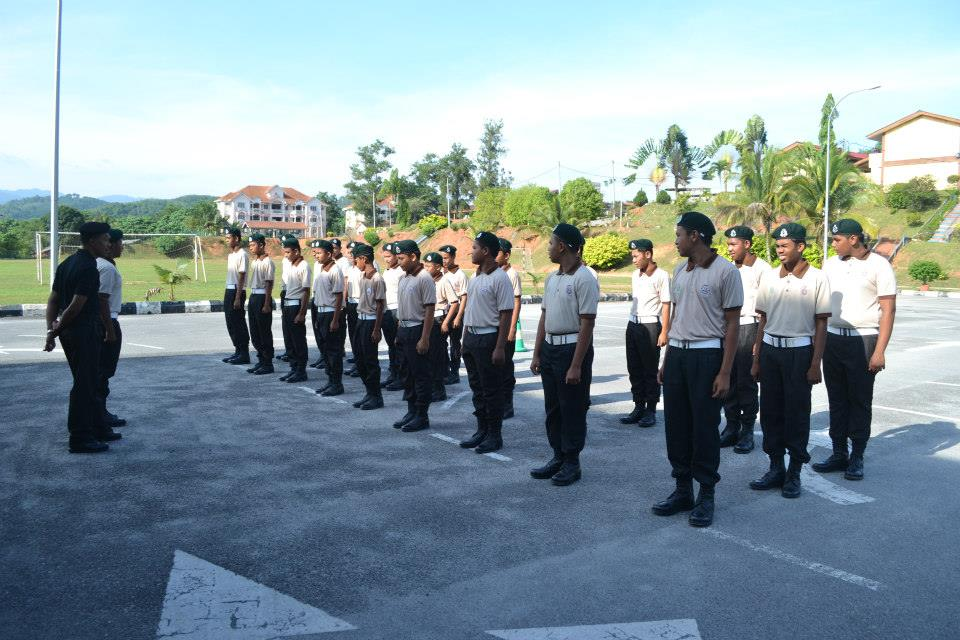 Pasukan Kadet Koreksional SMK Undang Jelebu